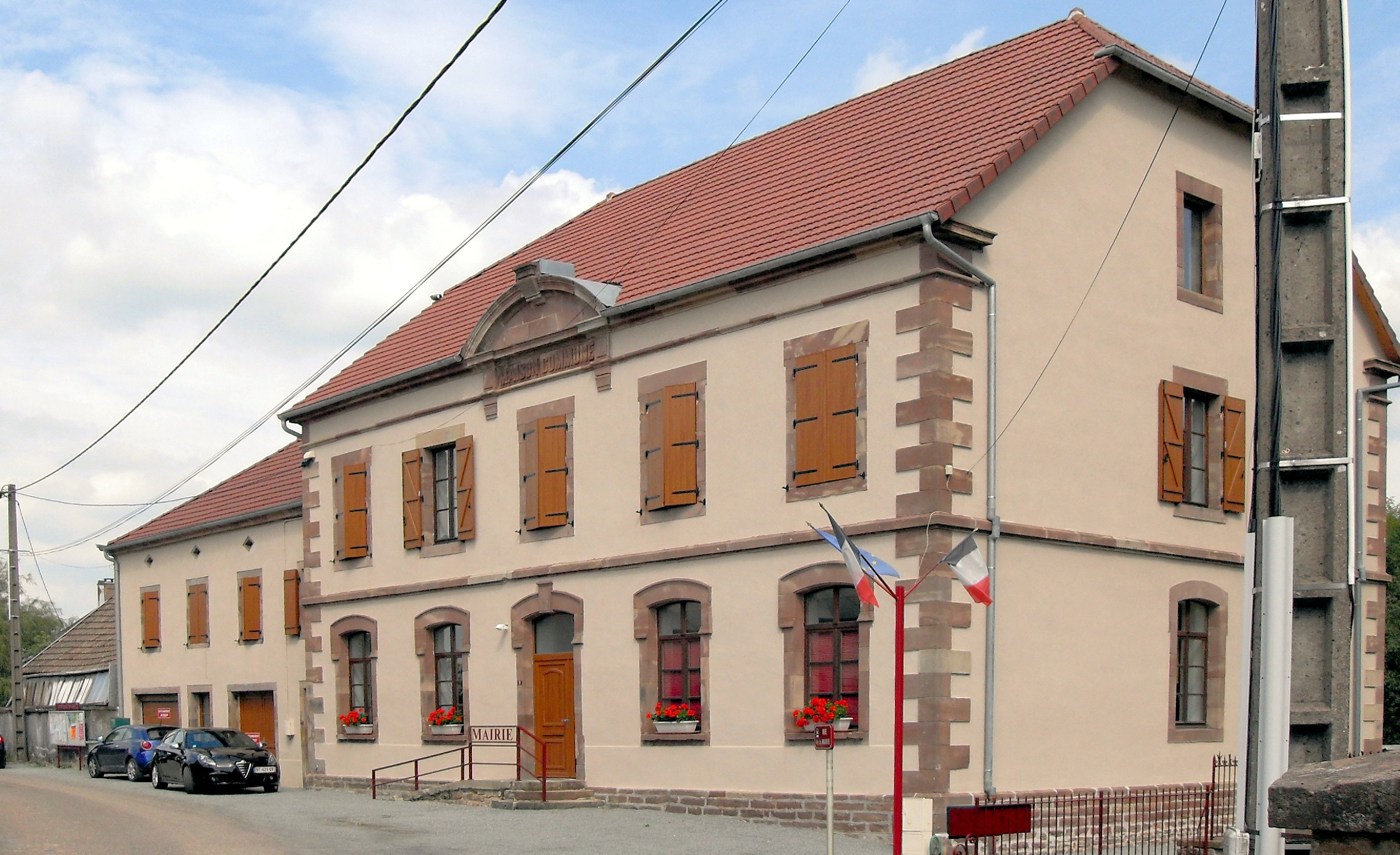 La mairie de Lomont